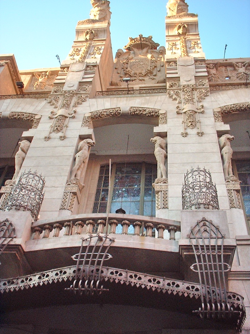 Club Español Rosario